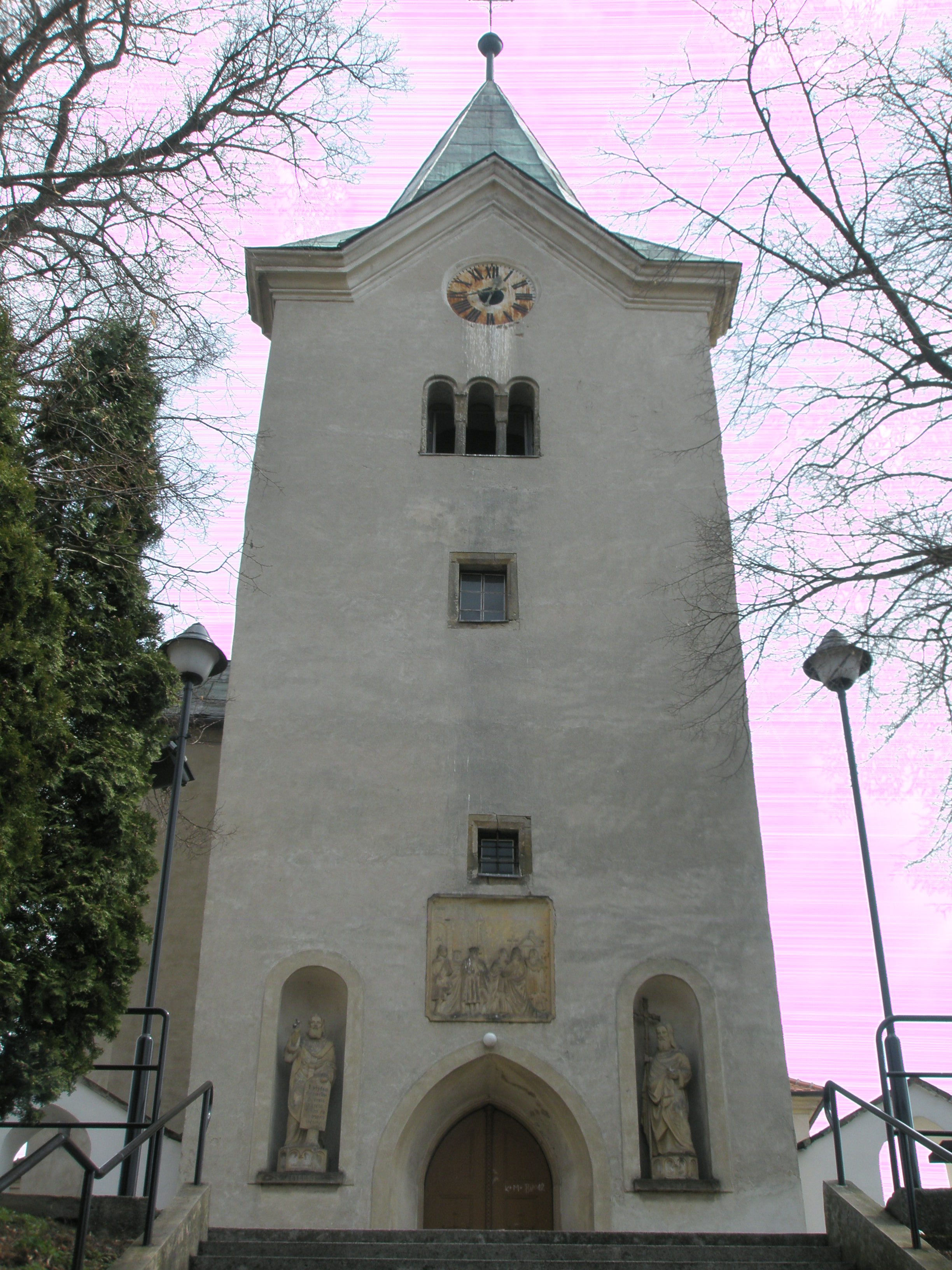 Kostel sv. Jiří